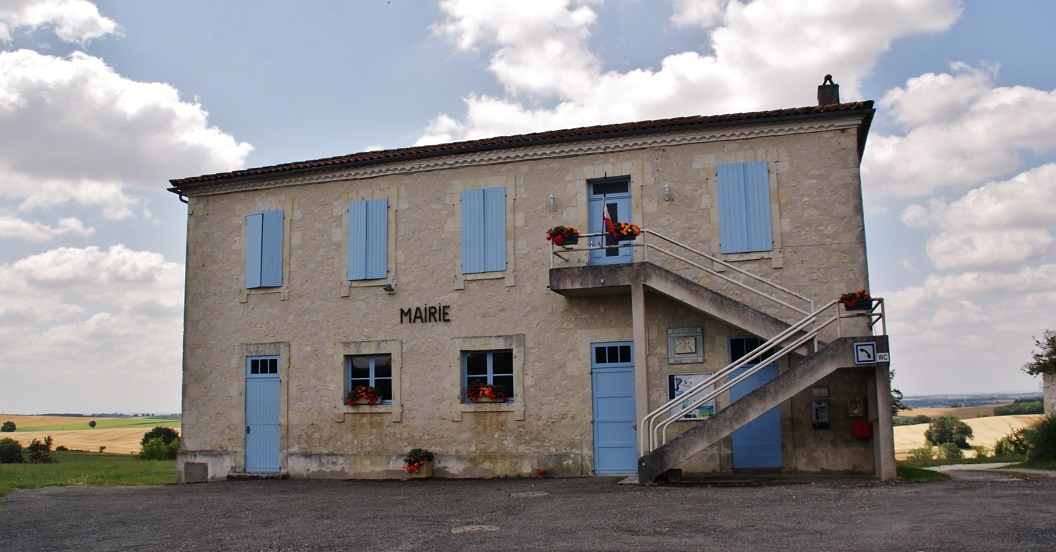 La Mairie